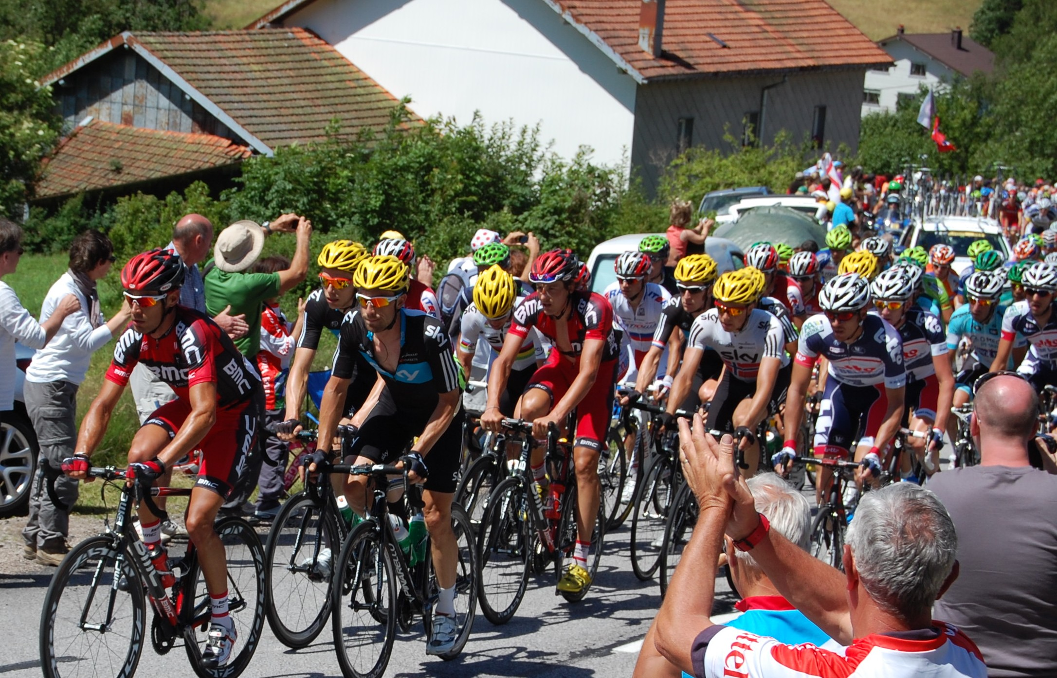 7e étape du Tour de France 2012, passage du peloton au bas du col de Grosse Pierre.